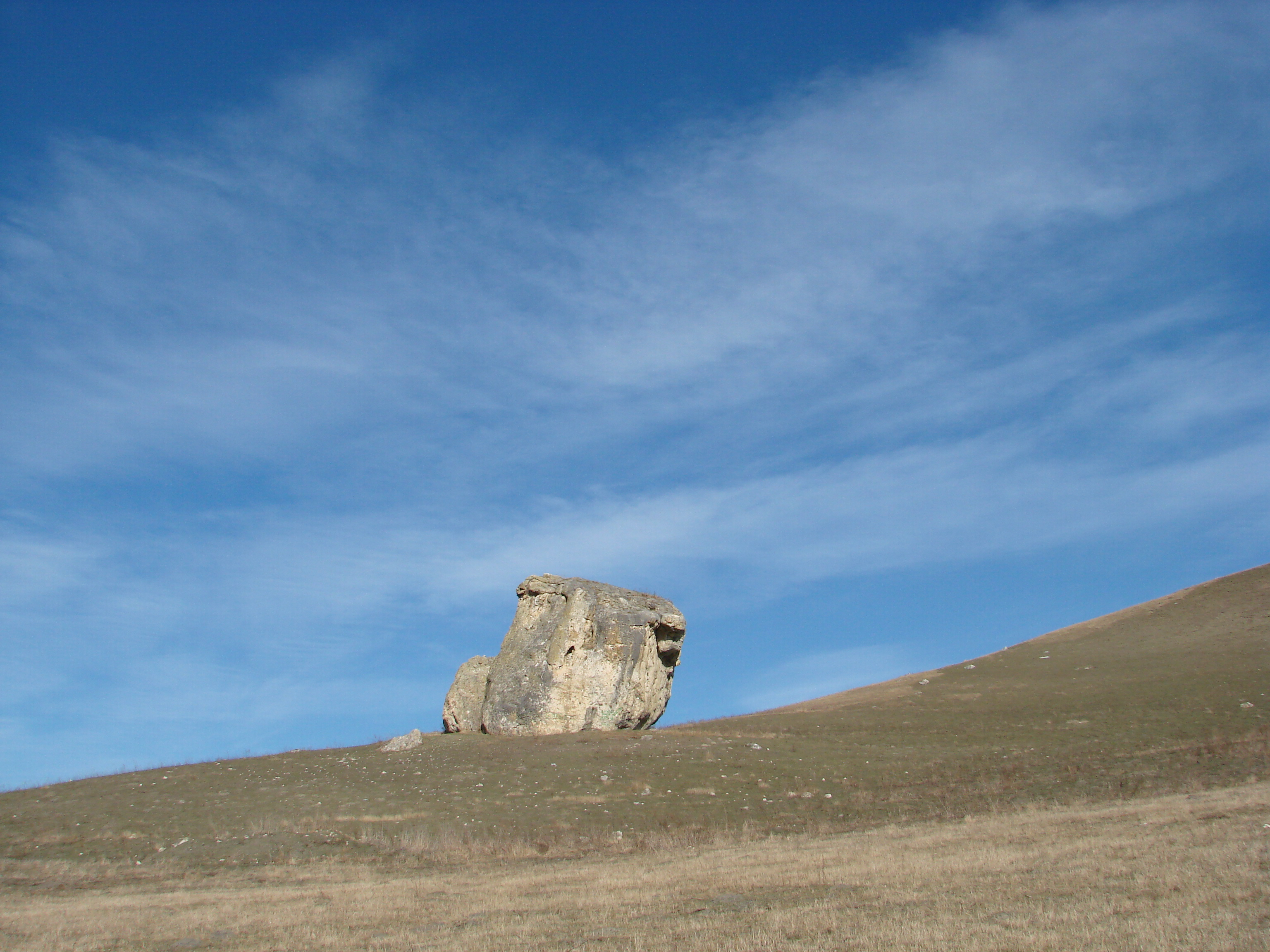 камень на горе